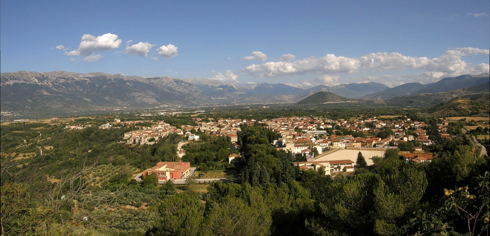 Raiano